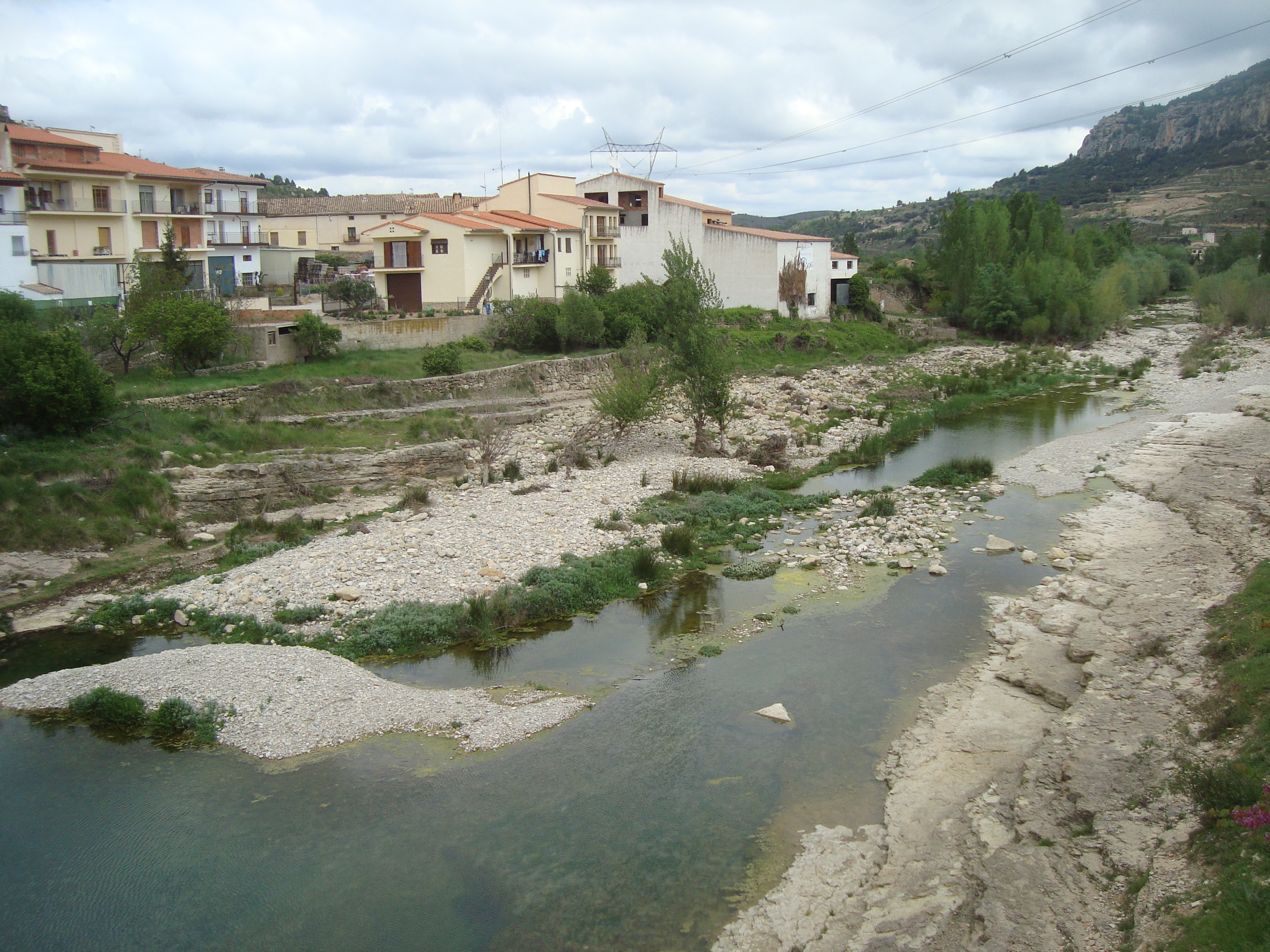 Río Caldés o Calders a su paso por Forcall